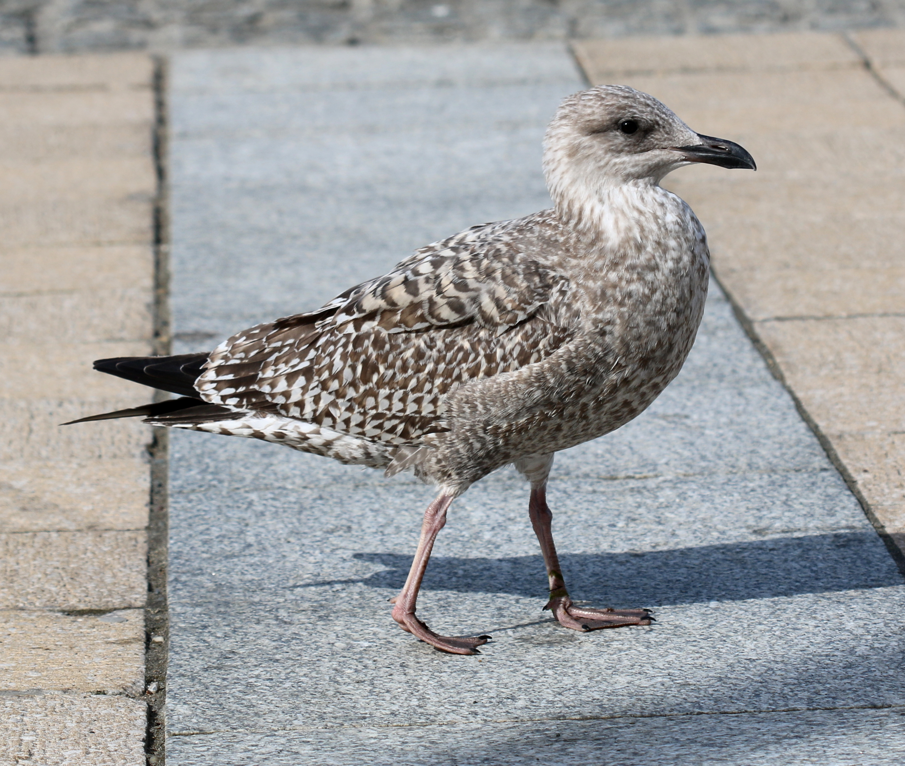 Aberystwyth, Ceredigion, Wales